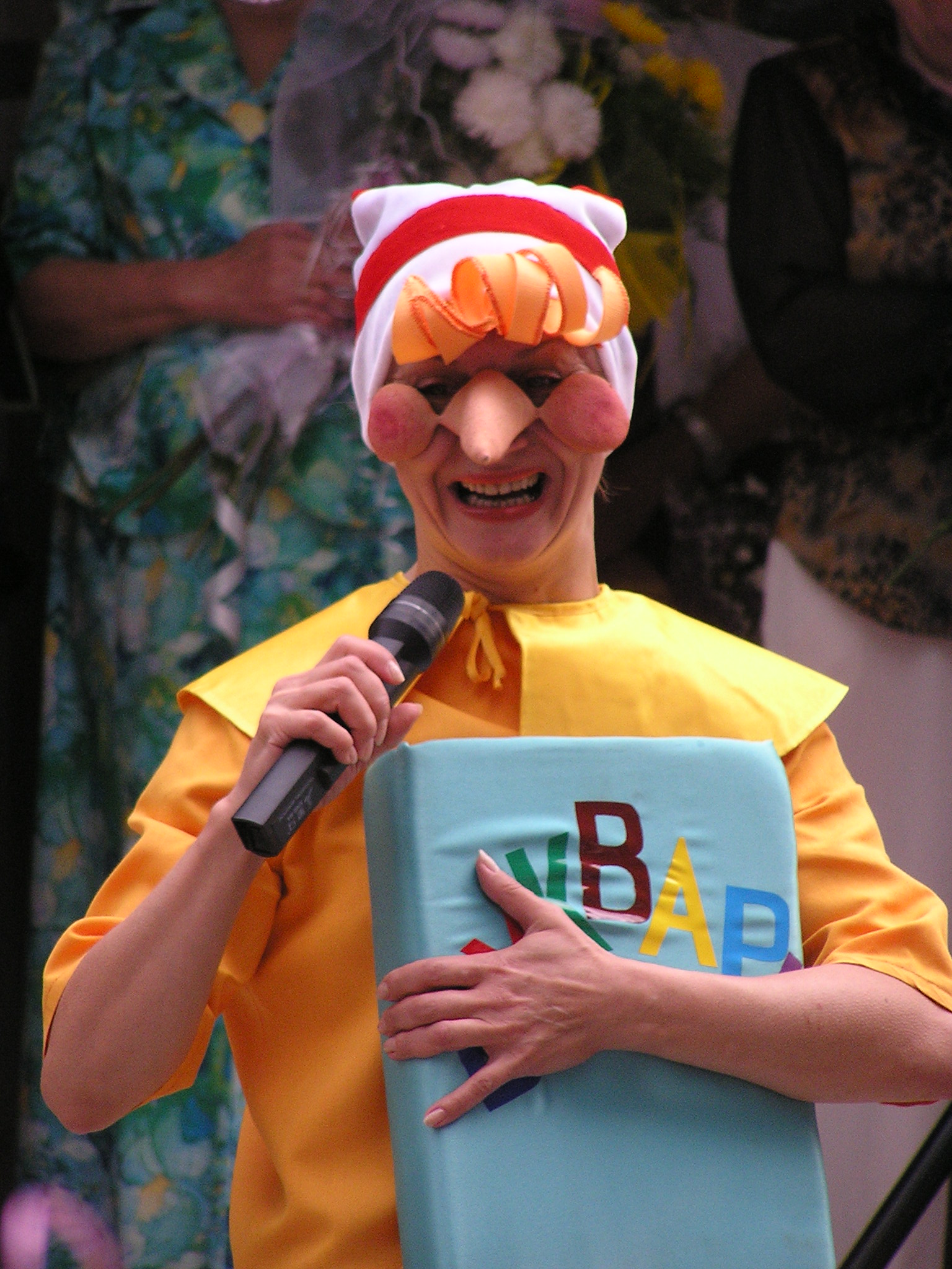 Актёр в костюме Буратино на празднике первого звонка в 69 школе города Донецка